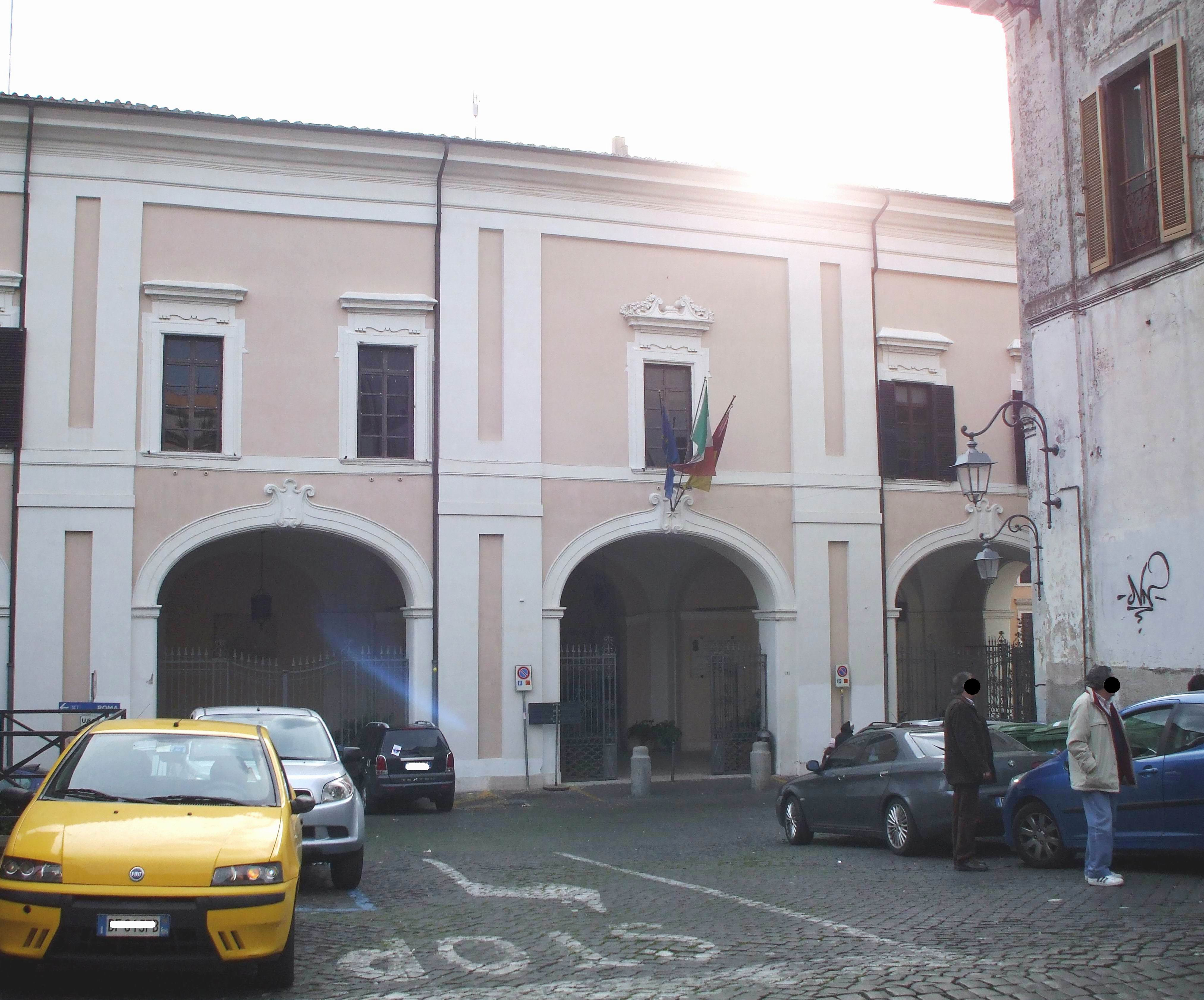 Albano Laziale - Palazzo Savelli - sede Comune